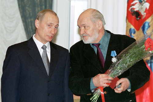 МОСКВА, КРЕМЛЬ. Церемония вручения государственных наград. Орден Почета вручен писателю Юрию Фёдоровичу Карякину.